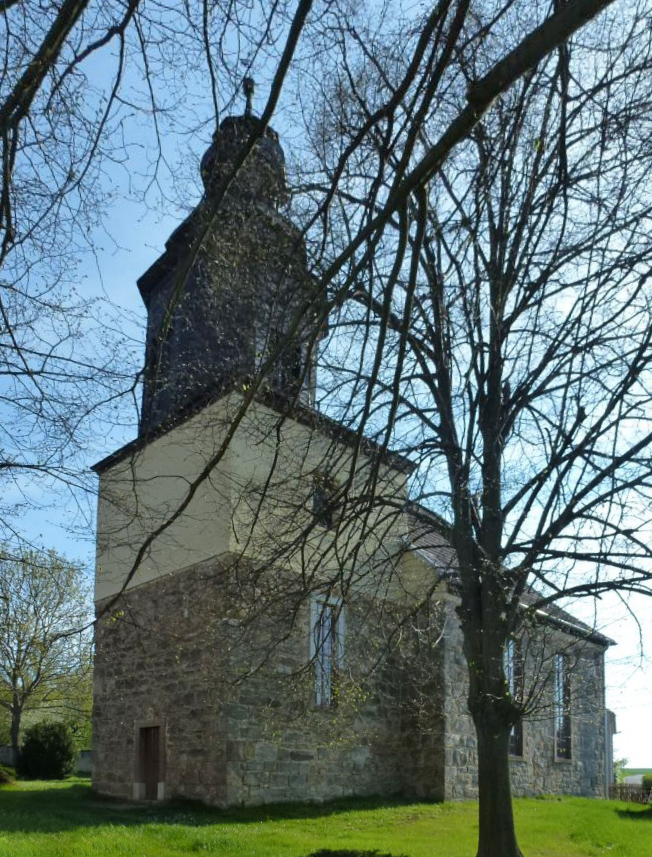 Kirche in Waldau